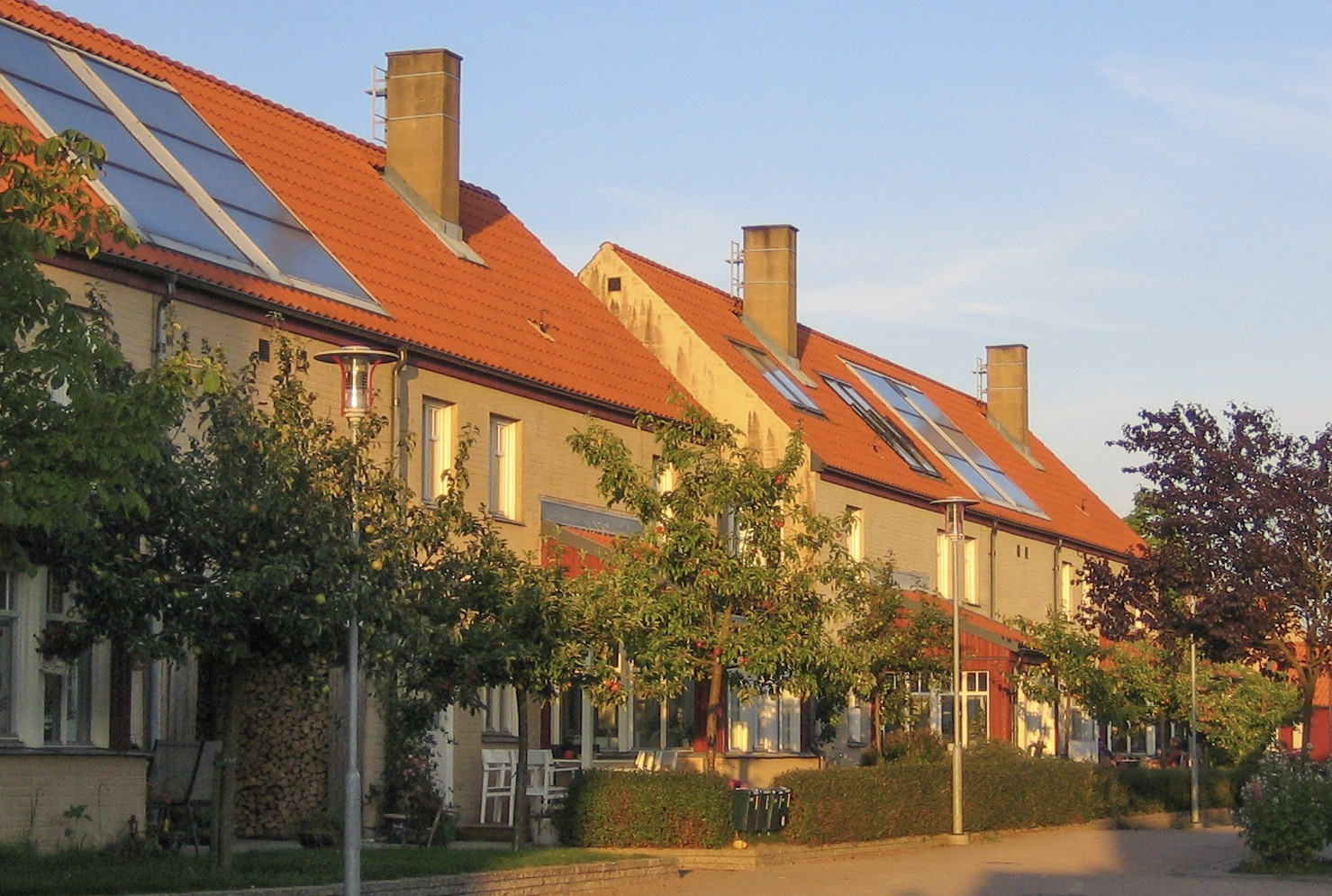 Toarp ecological village, Oxie, Malmö